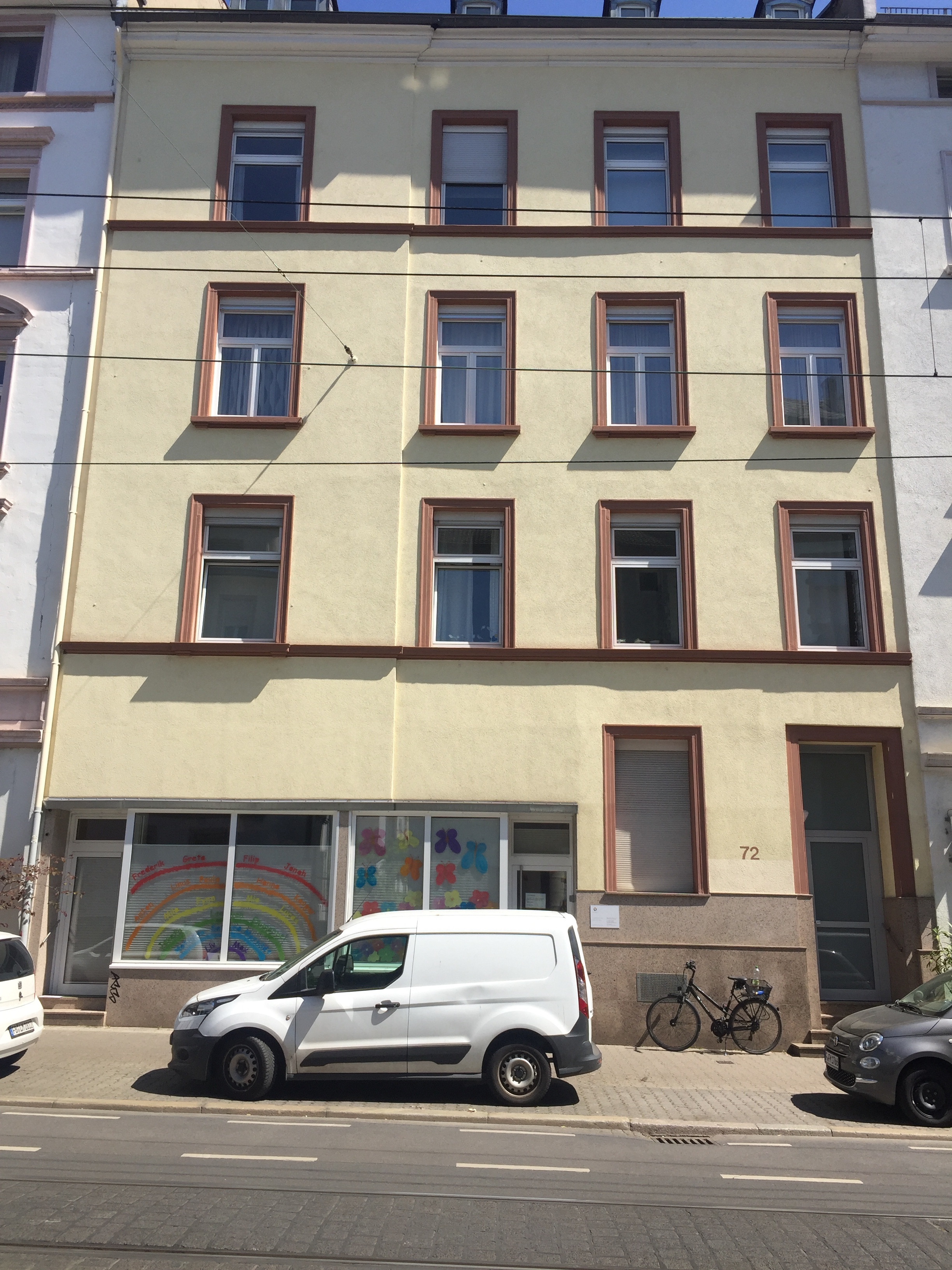 In den Jahren 1973-79 war im Erdgeschoß des Hauses in der Eckenheimer Landstrasse 72 in Frankfurt am Main das erste Frankfurter Frauenzentrum.